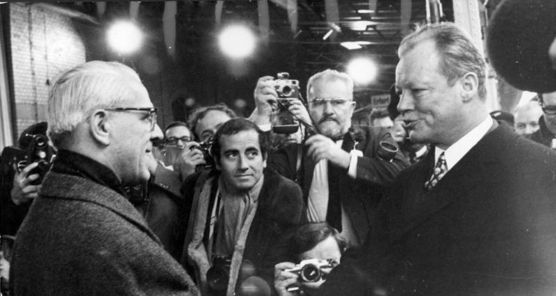 Zentralbild/ Sturm/ 20. 3. 70/ Erfurt: Treffen Stoph–Brandt Zu den offiziellen Gesprächen zwischen der DDR und der westdeutschen Bundesrepublik traf der Bundeskanzler der BRD, Willy Brandt, mit einem Sonderzug am 19.3.70 in Erfurt ein. Auf dem Erfurter Bahnhof wurde Kanzler Brandt (rechts) vom Vorsitzenden des Ministerrates der DDR, Willi Stoph (links), empfangen.